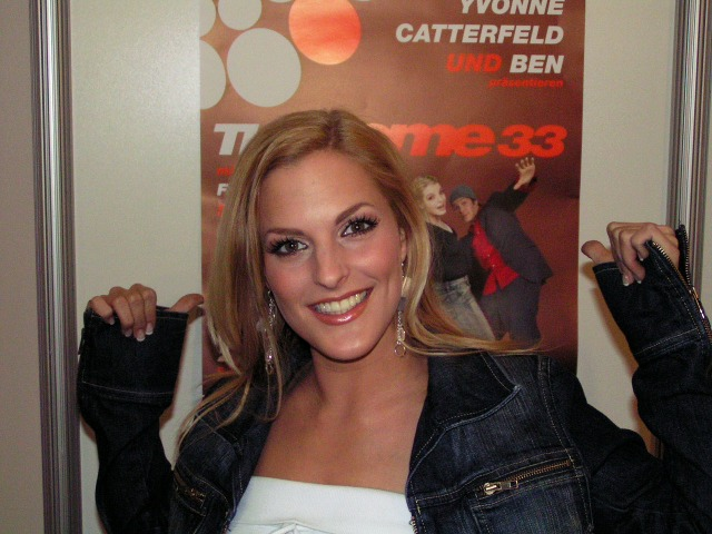 Sandy Mölling beim Dome 33. Österreich, Salzburg, Salzburgarena